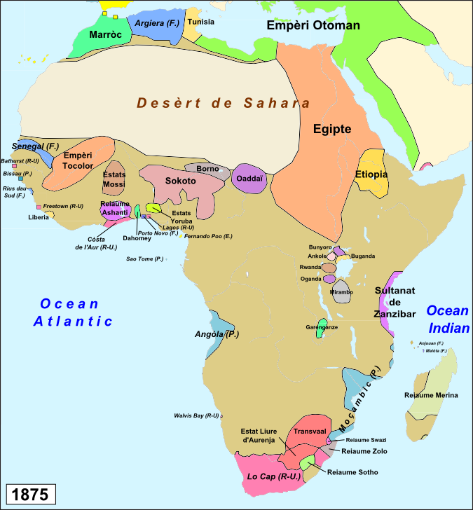 Africa en 1875.